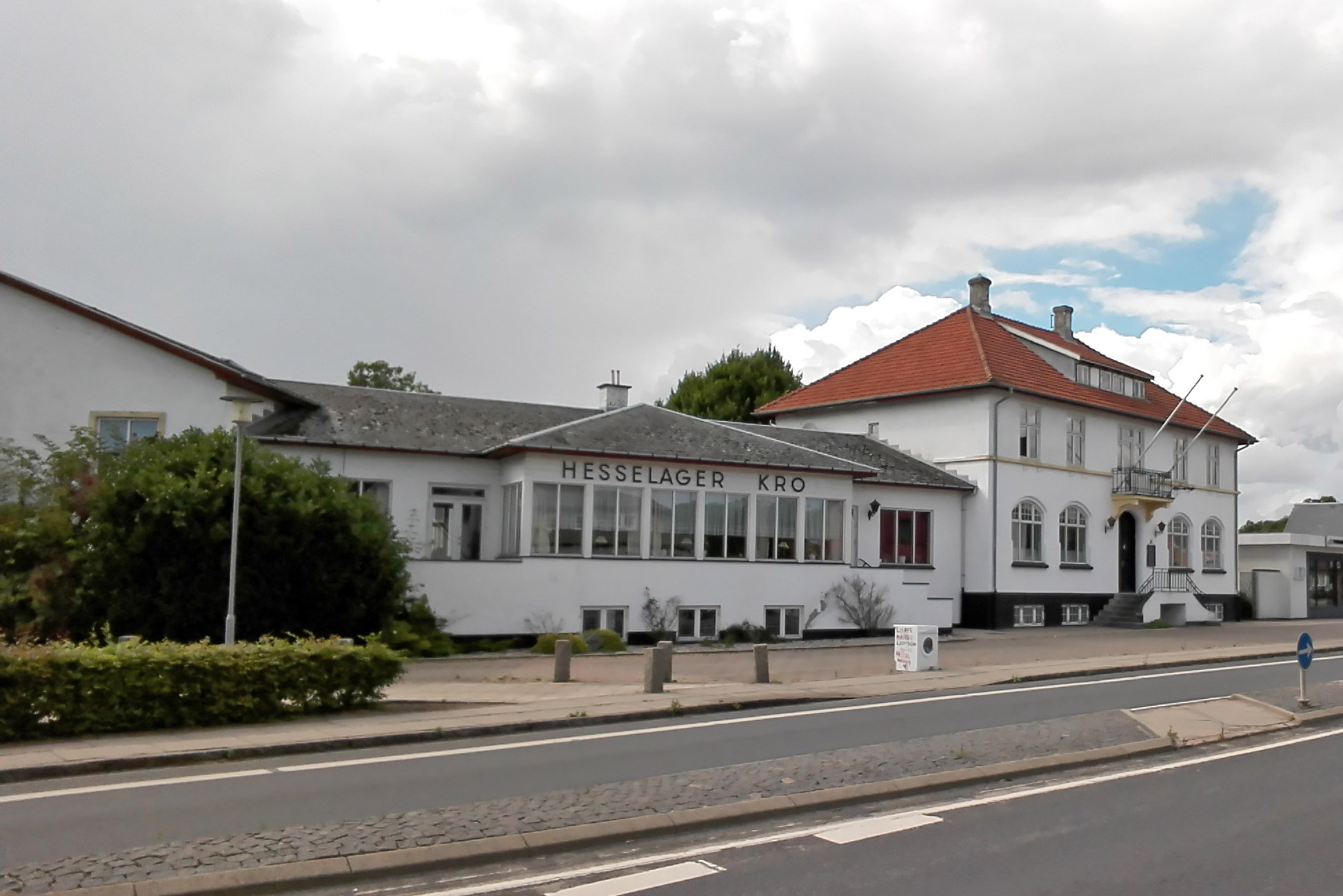 Hesselager Kro